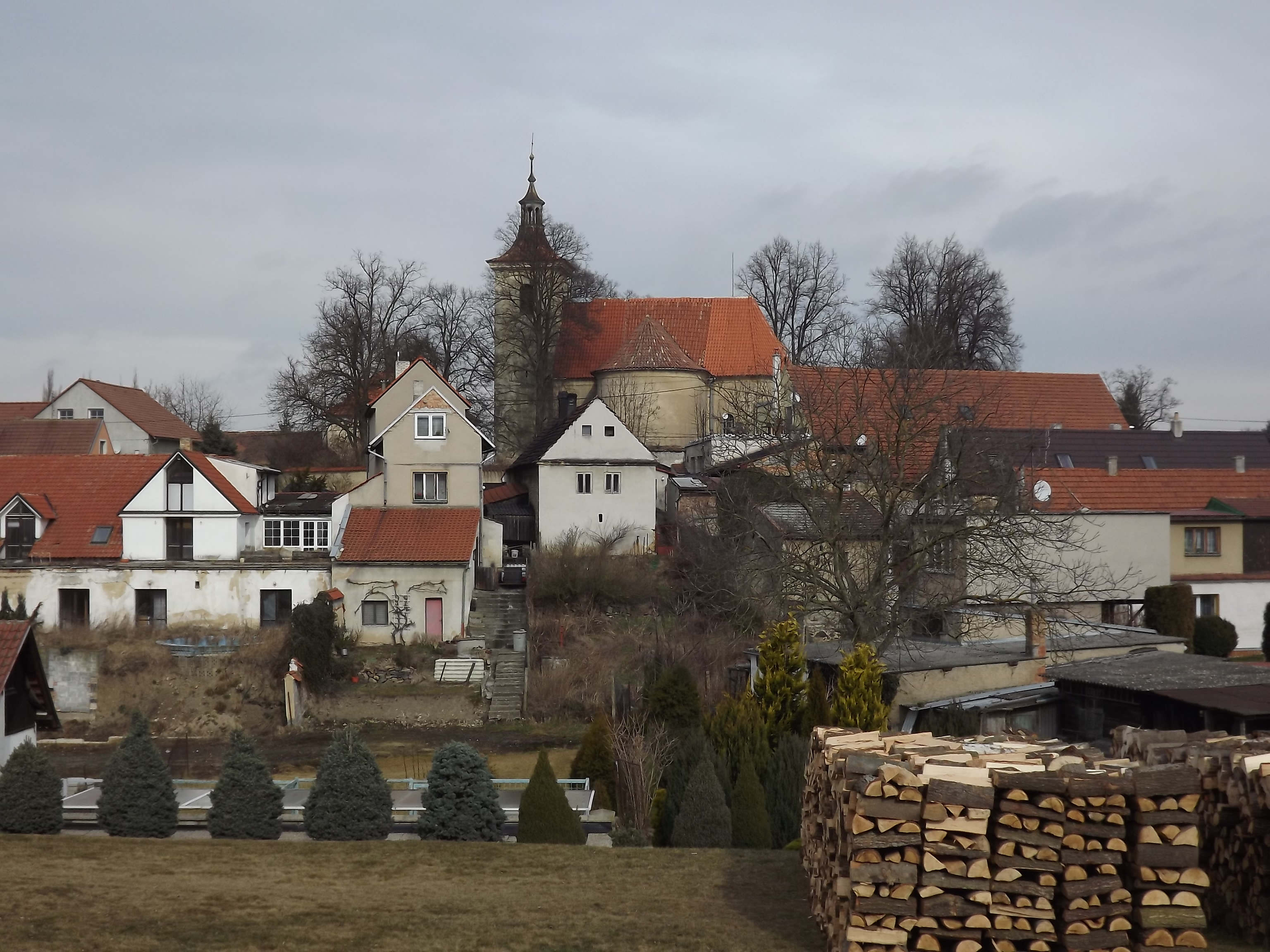 Svárov, pohled na kostel